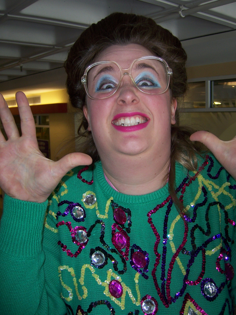 Leslie Hall